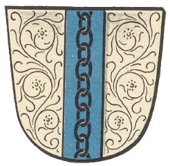 Wappen von Kettenheim in RLP